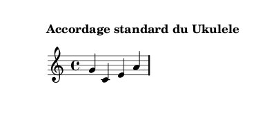 accord pour chacune des cordes du ukulélé de haut en bas, de la quatrième à la première corde.